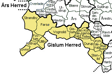 Gislum Herred, Aalborg Amt, Denmark